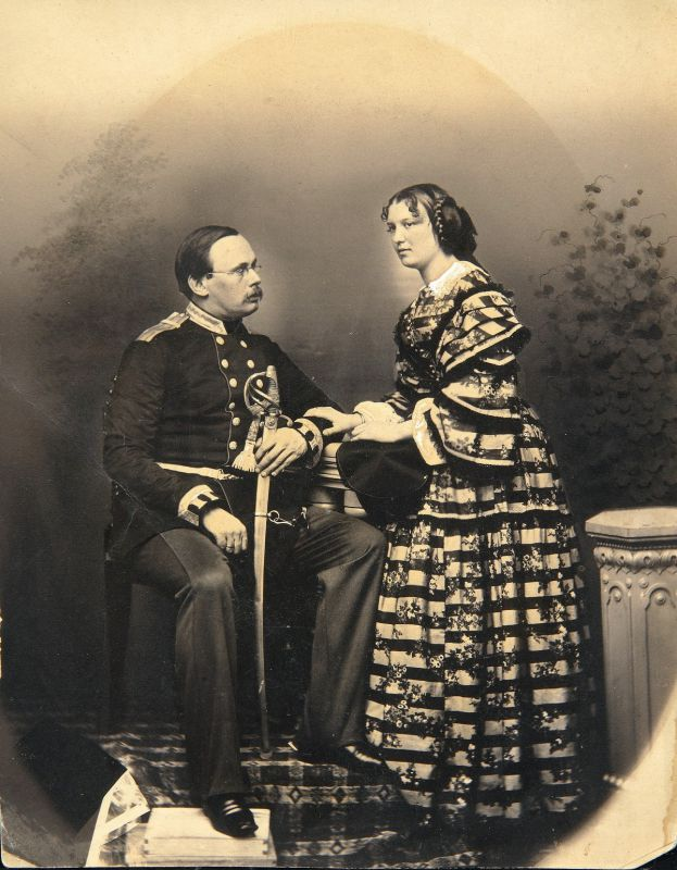 Историк Орлов,Николай Михайлович (1822-1886) и его жена Ольга Павловна, ур. Кривцова (1838-1926).